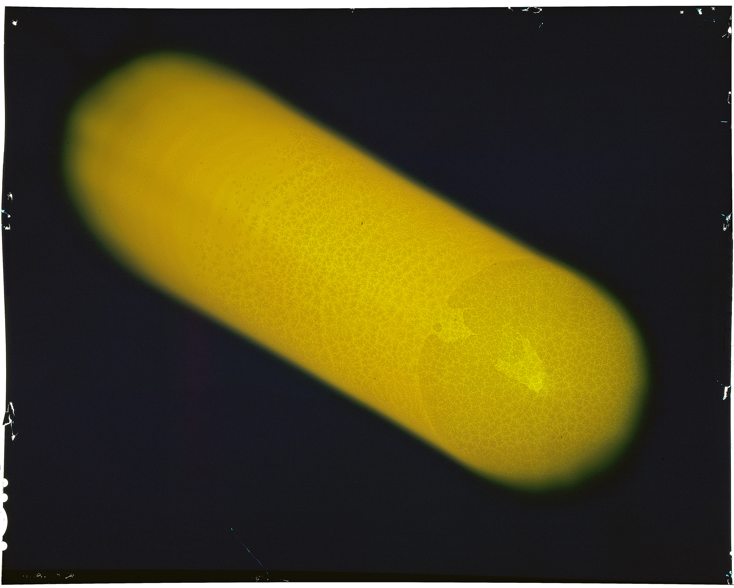 Claus Stolz Heliografie, 2016, Originalfilm und div. Auflagenformate und Editionen, bis 100 x 80 cm